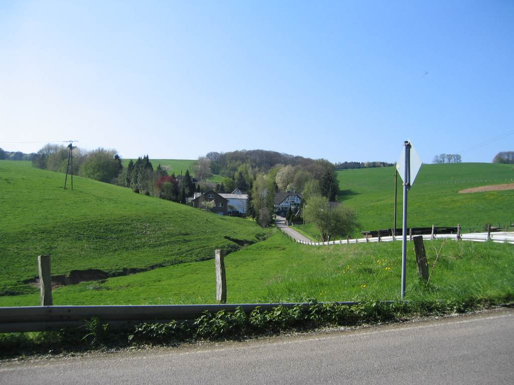 Ortschaft Ellersbach, Lindlar